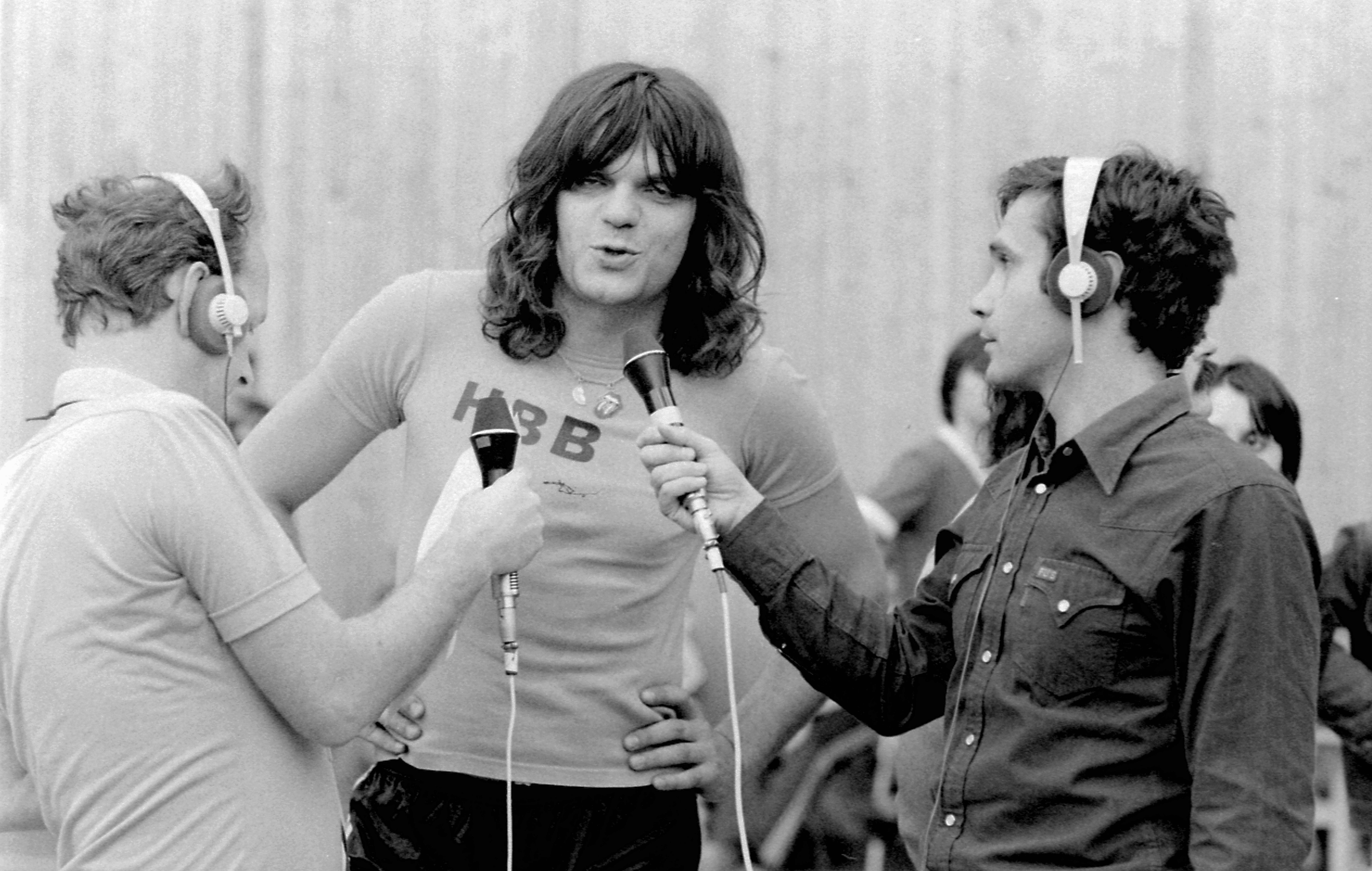 középen Földes László (Hobó), balra Novotny Zoltán, jobbra Gyárfás Tamás riporter. Location: Hungary Tags: pop music, radio report, celebrity Title: középen Földes László (Hobó), balra Novotny Zoltán, jobbra Gyárfás Tamás riporter.